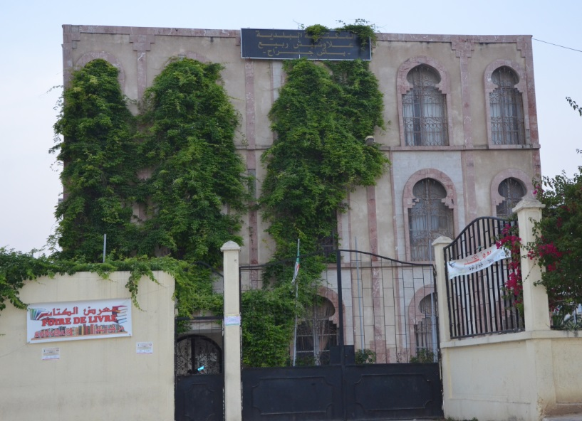 Bibliotheque municipale de Bachdjerrah